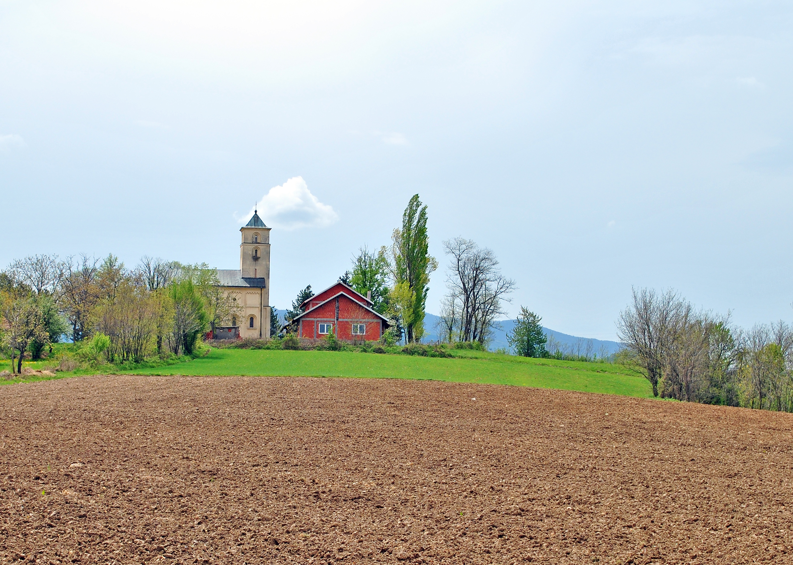 Crkva u selu